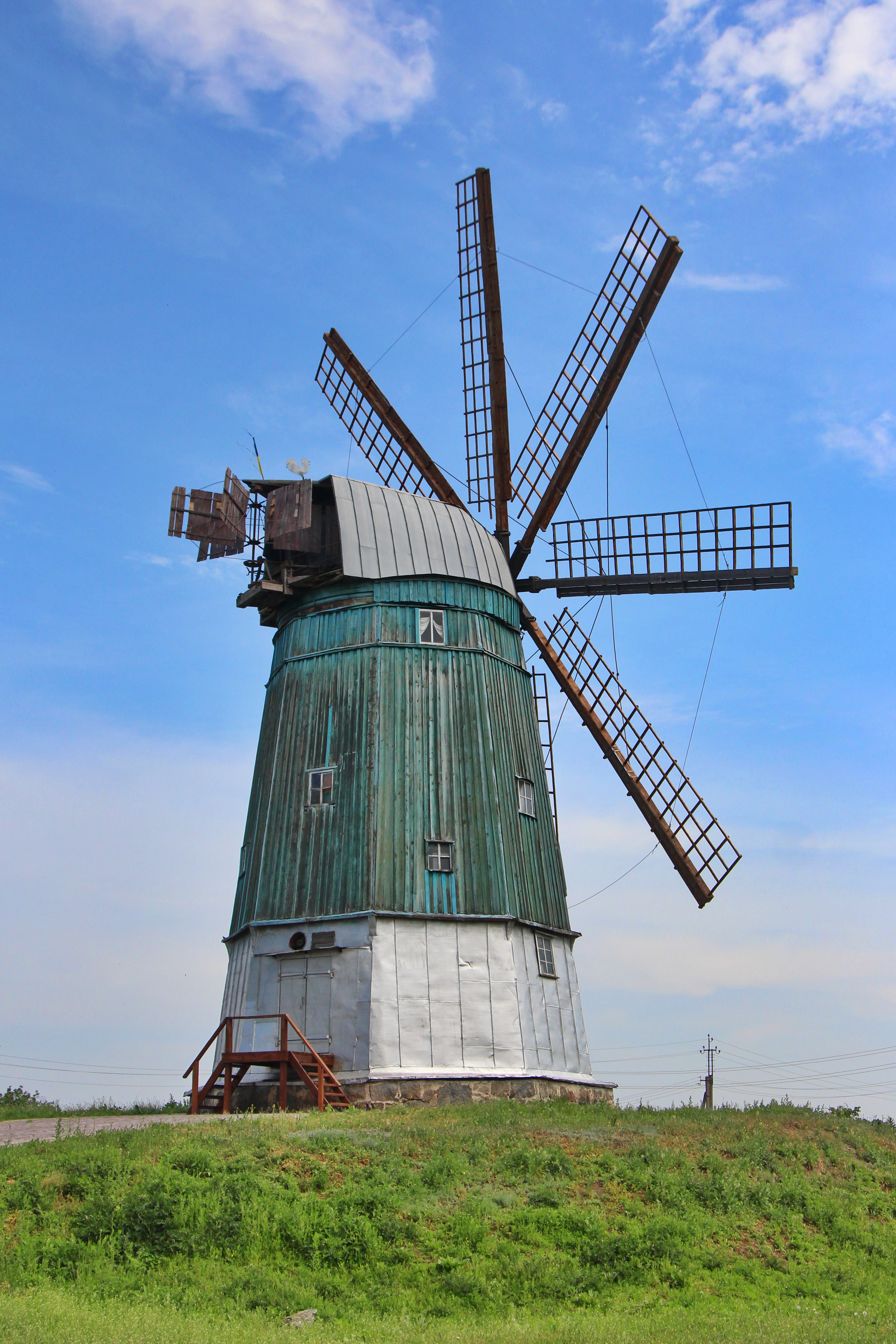 Вітряк, Пустовіти